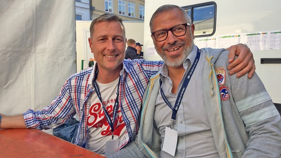 Marko Vogt und Ex-Fussballspieler Jimmy Hartwig